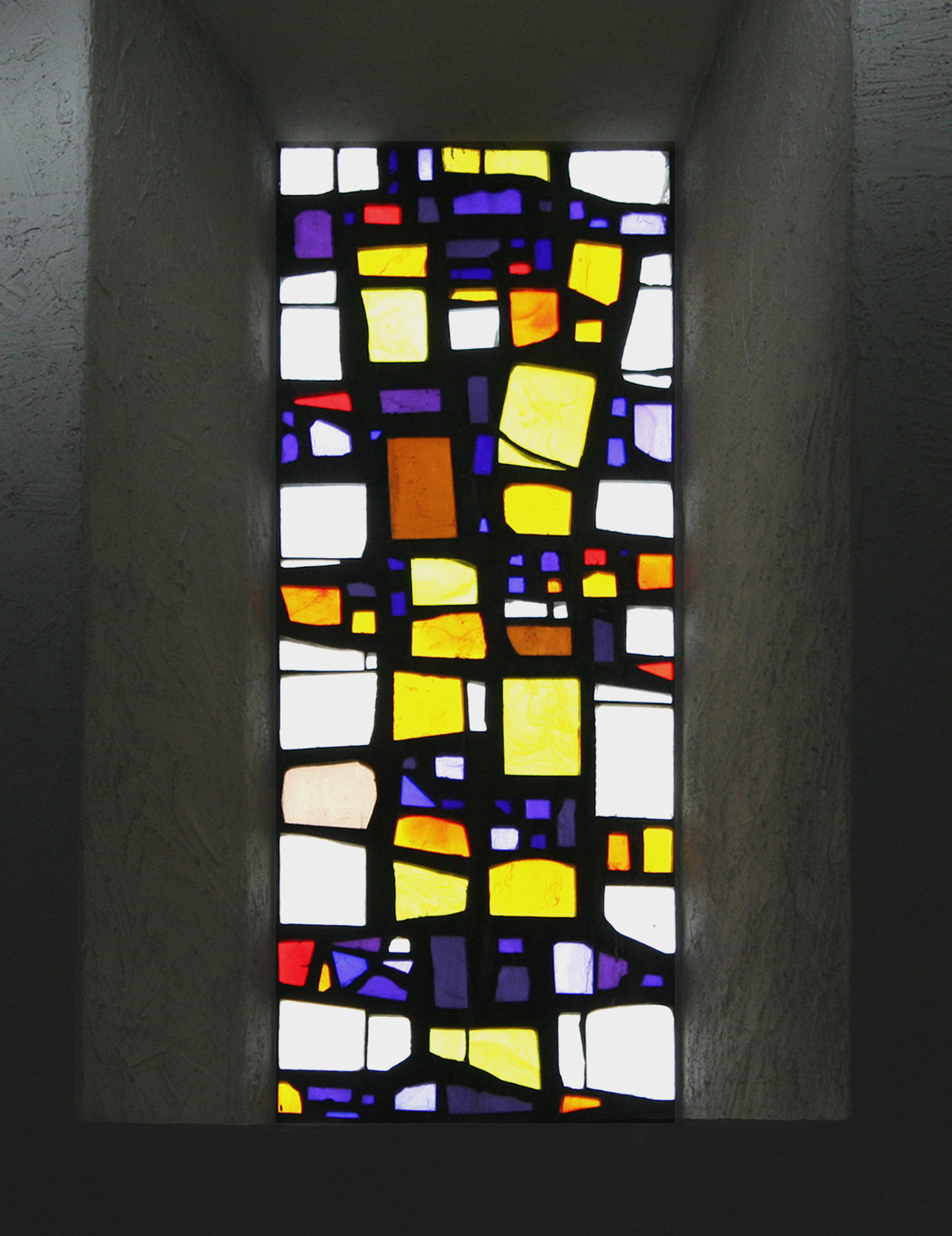 Römisch-katholische Pfarrkirche St. Mauritius Oberengstringen, Fenster an der Südseite